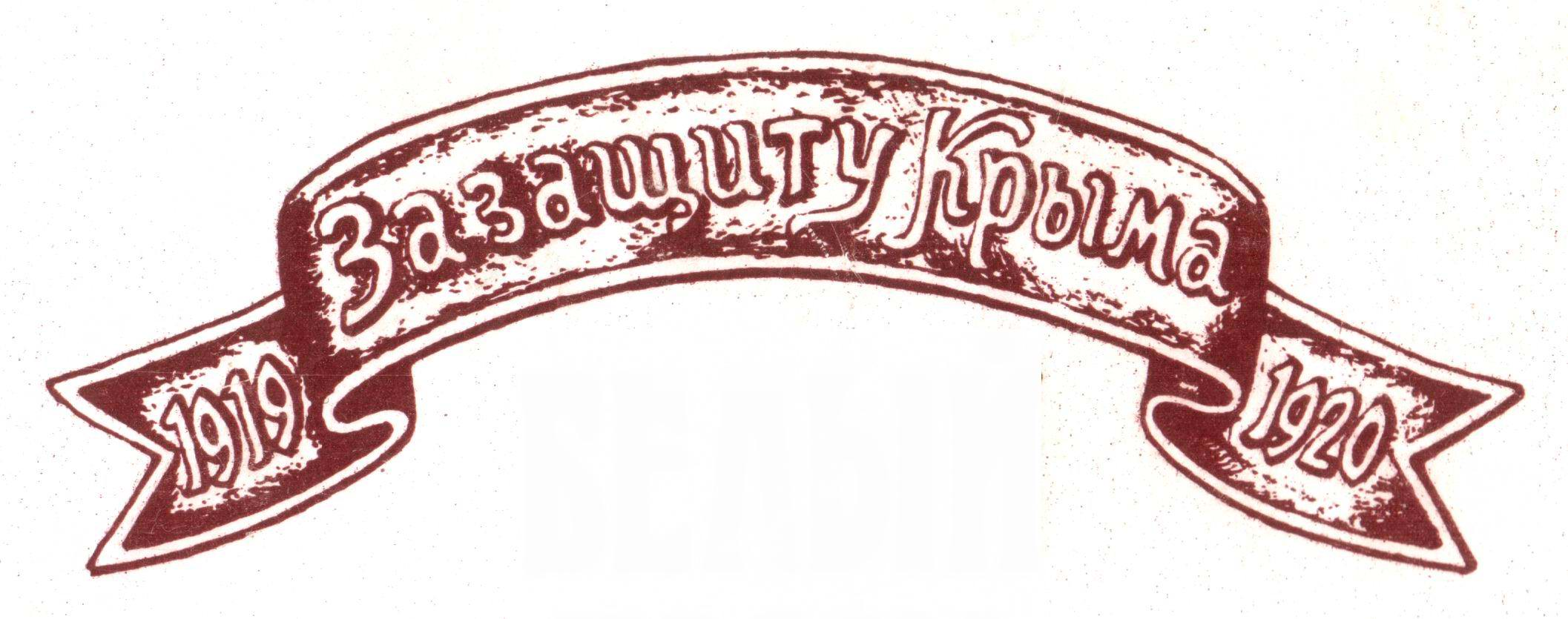 Награда защитникам Крыма «1919. За защиту Крыма. 1920»